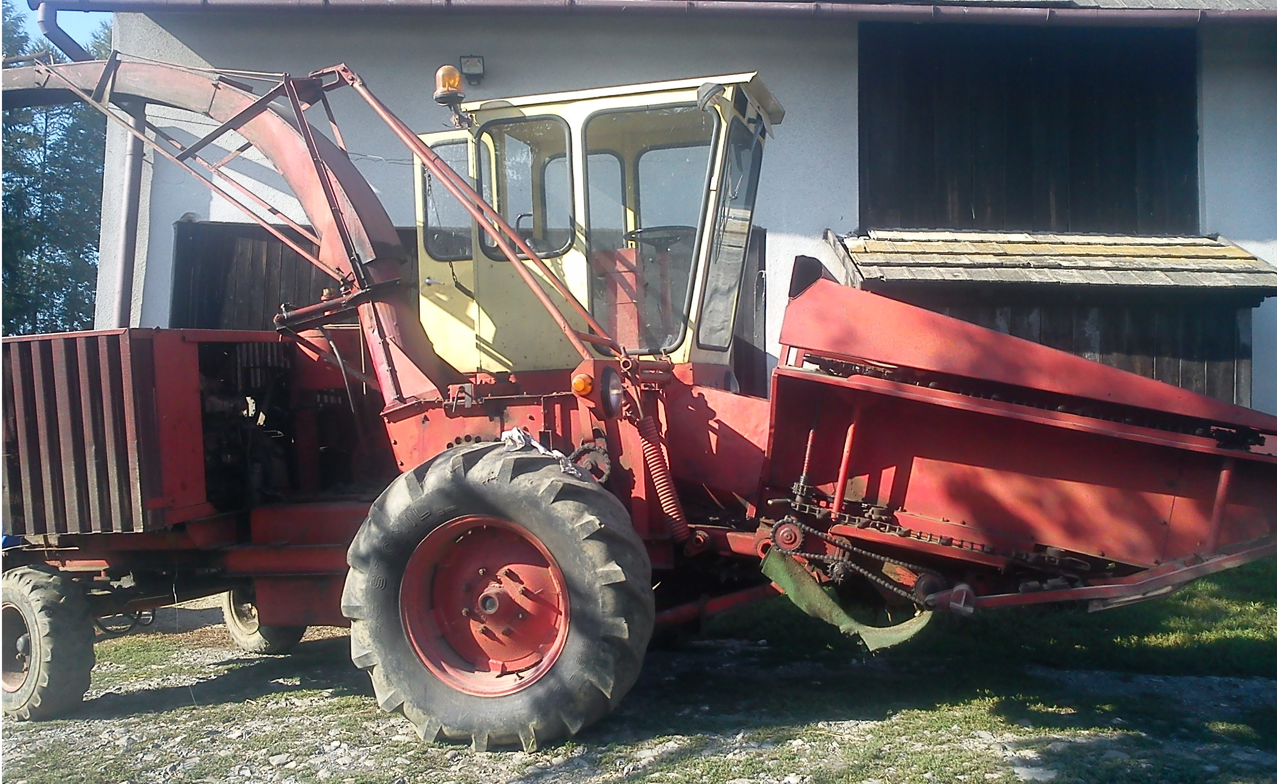 widok z prawej strony